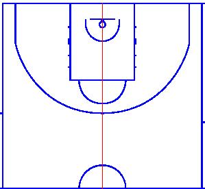 Podział boiska do koszykówki na stronę piłki i pomocy (mocną i słabą)